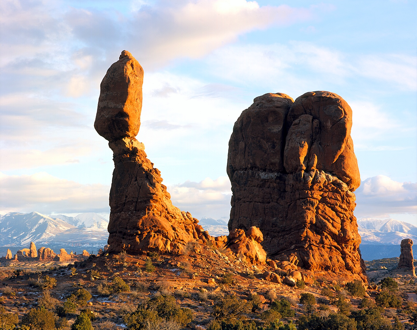 Balanced Rock (Arches-Nationalpark)